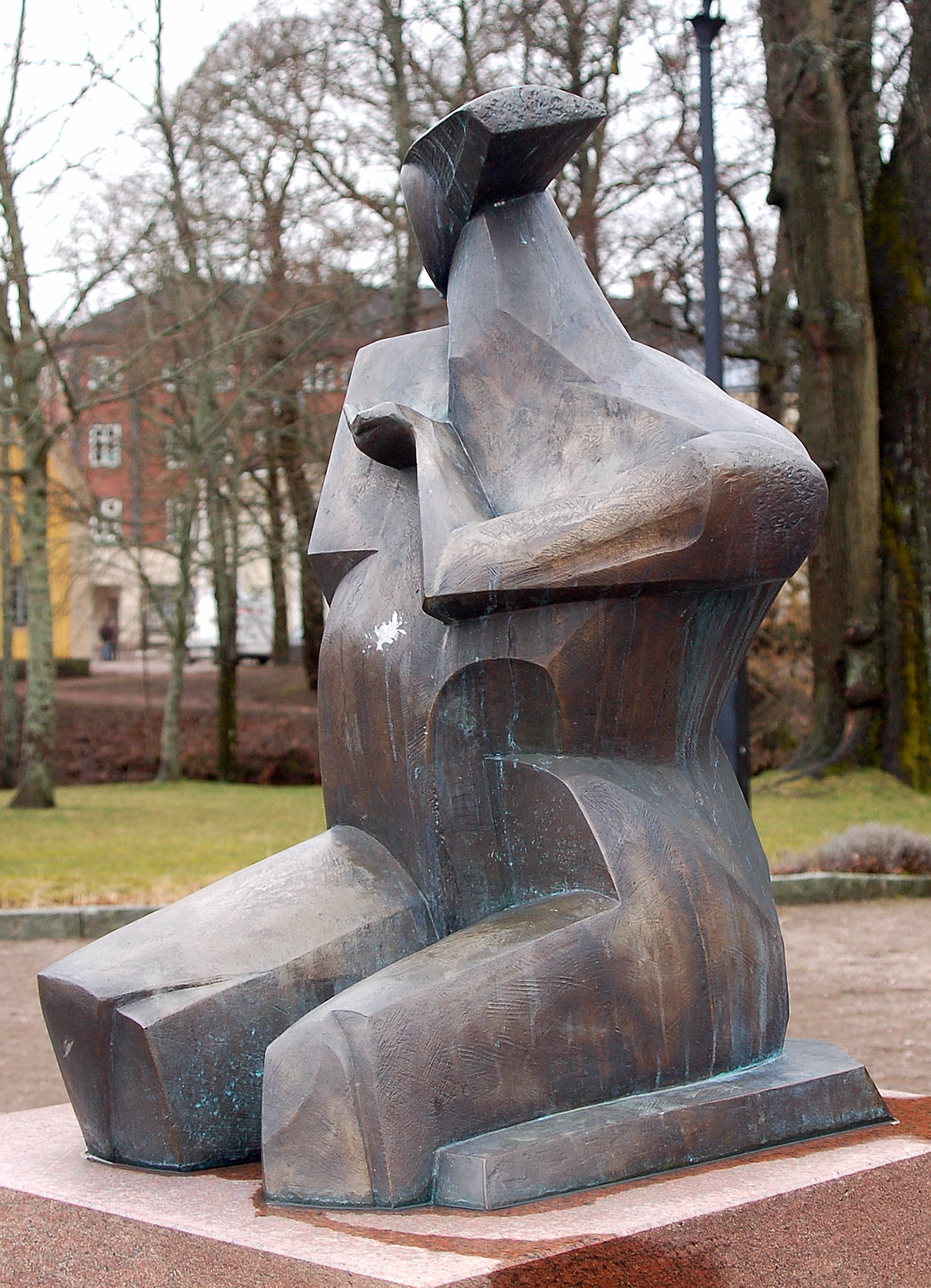 Kvinna av Lorraine Rantala 1997 placerad i Brogårdsparken Kristinehamn.